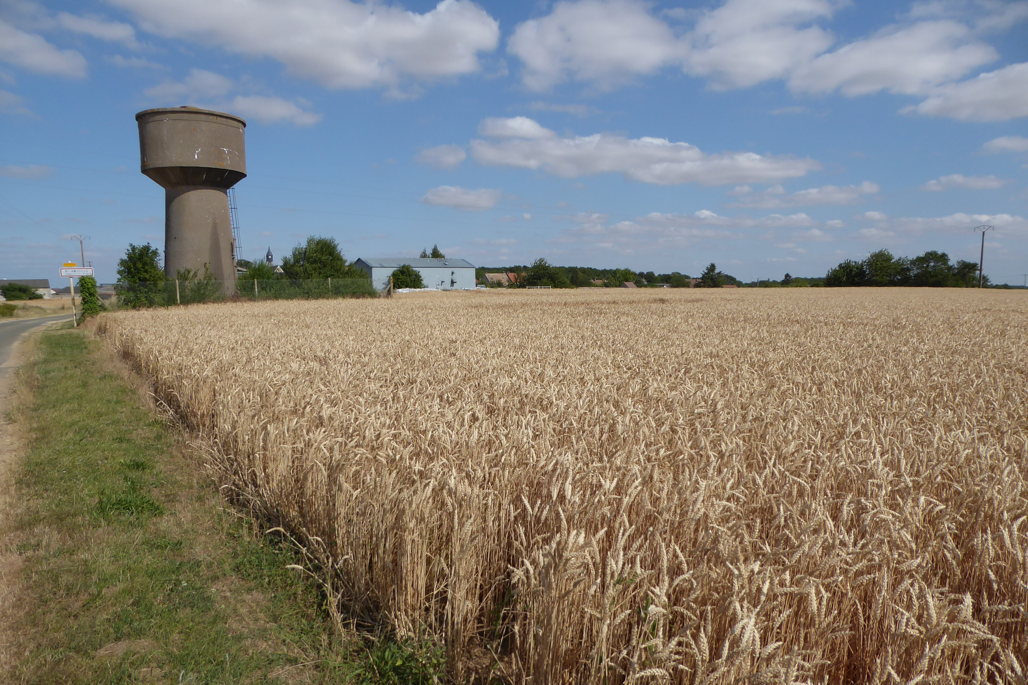 Entrée de Grandville, commune de Gommerville, Eure-et-Loir, France.